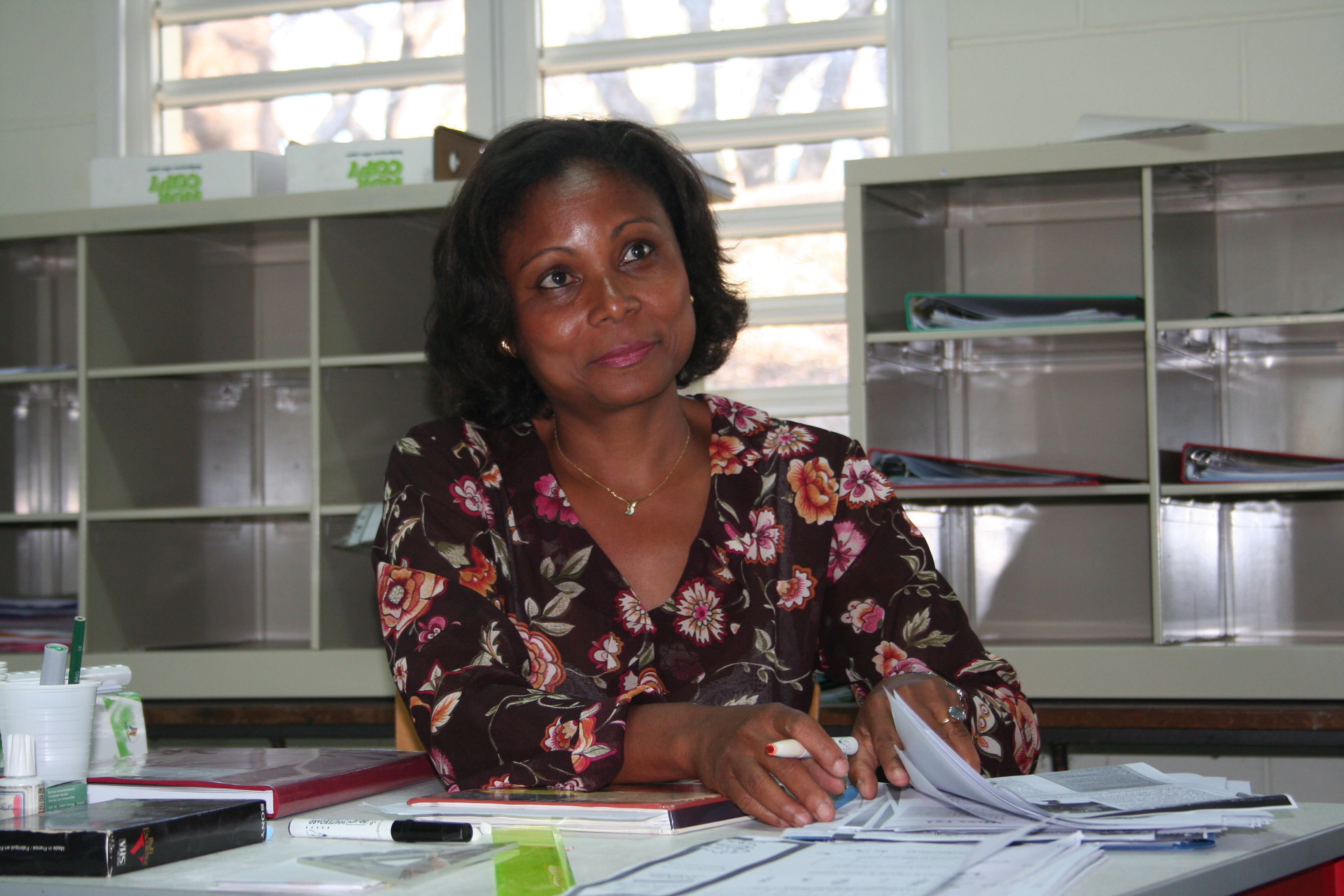 Monique Orphé dans une salle de classe à la Réunion.